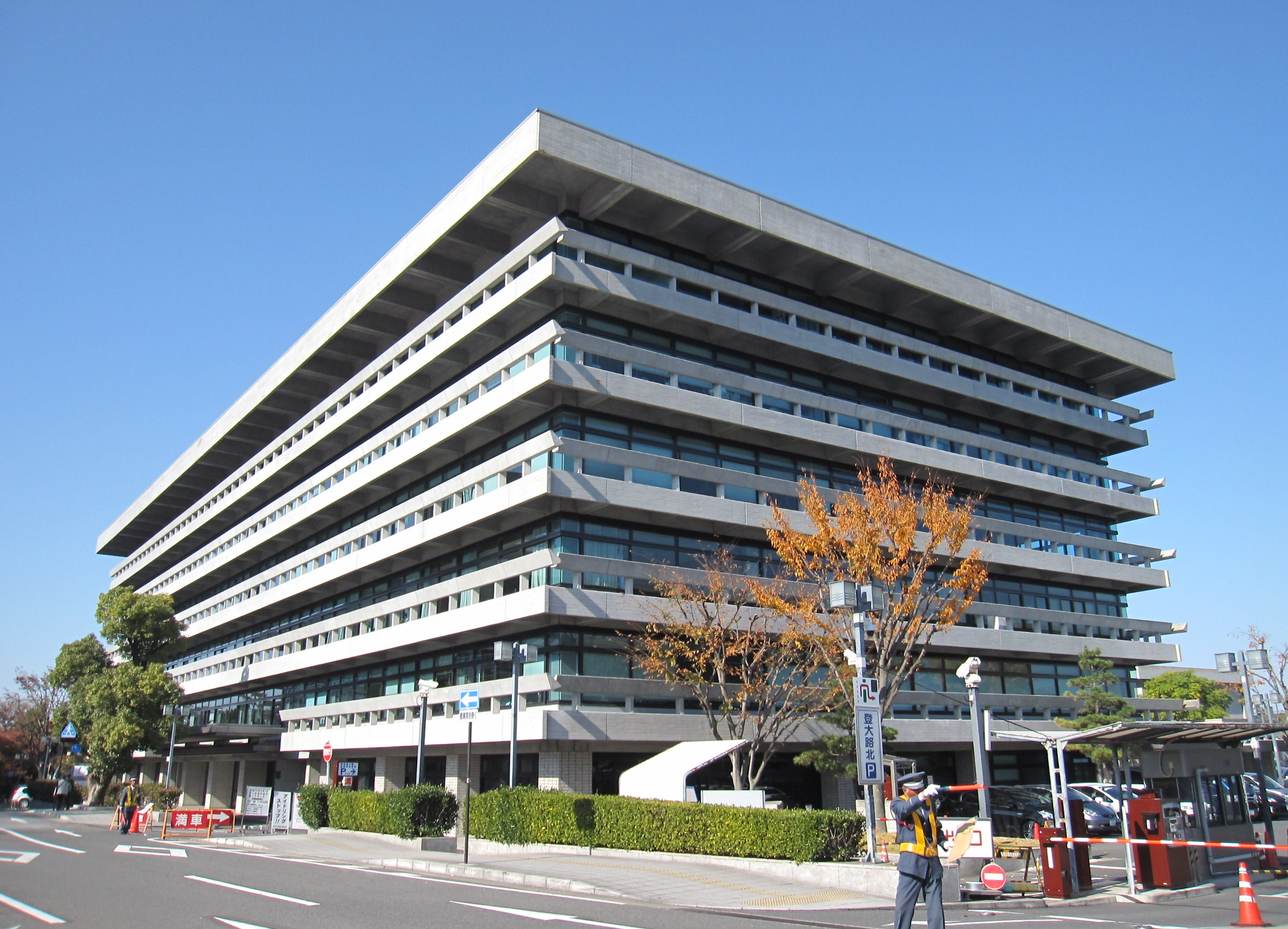 奈良県警察本部